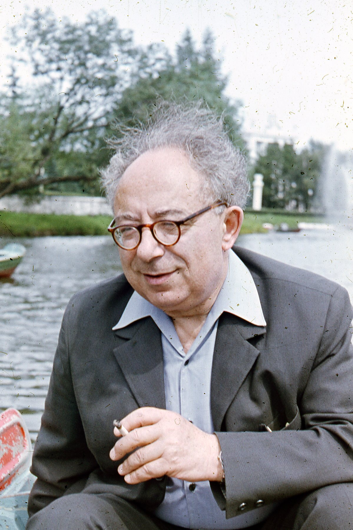 Портрет Мамета А.П.